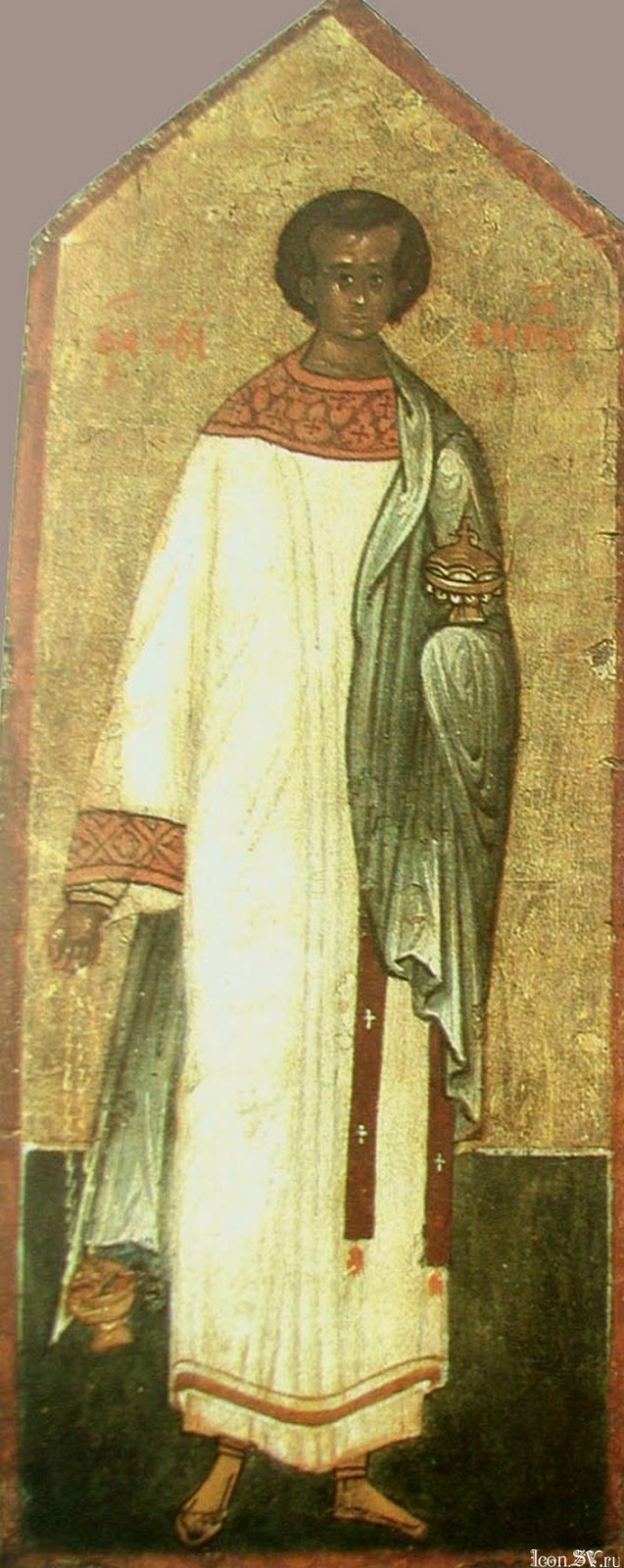 Святой Апостол Филипп диакон Россия, Москва. Середина XVI век